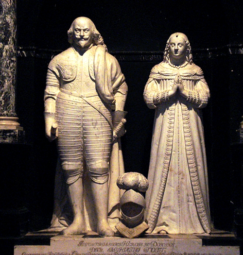 Åke Totts grav i Åbo domkyrka